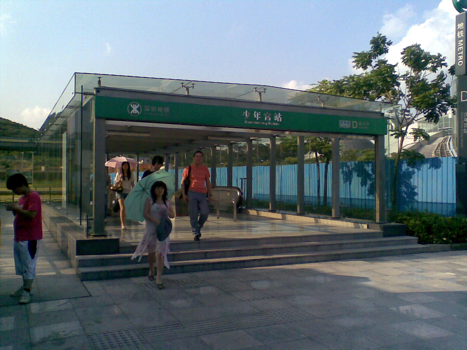 少年宮站